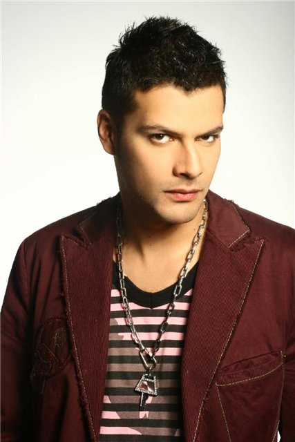 Tommy vasquez